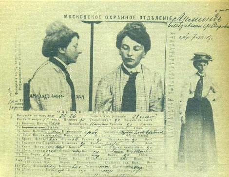 Scheda segnaletica della polizia di Mosca relativa a Inessa Armand (1874-1920)